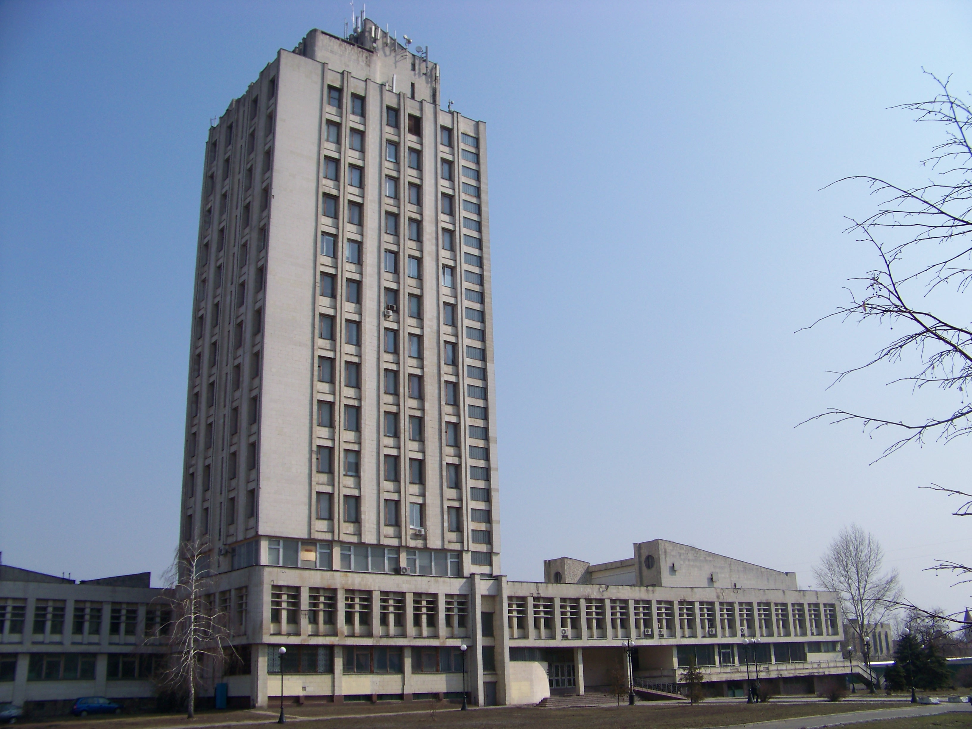 Будівля в Києві за адресою вул. Героїв Сталінграда, 12, де містяться Інститут археології та Інститут гідробіології Національної академії наук України.